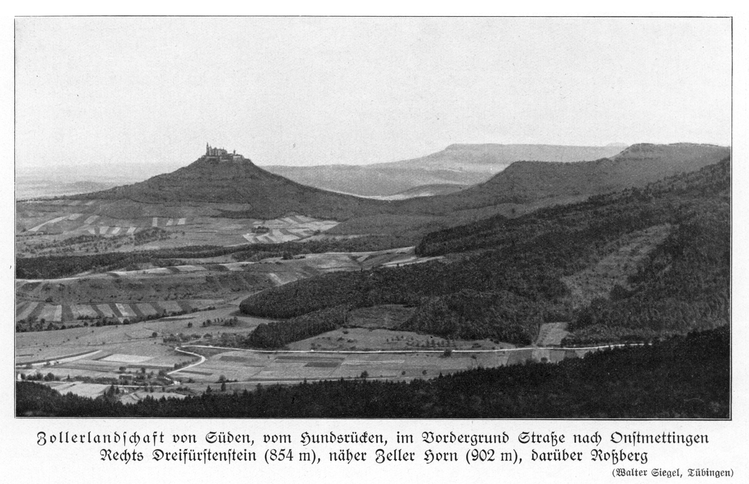 Zollerlandschaft von Süden, vom Hundsrücken, im Vordergrund Straße nach Onstmettingen. Rechts Dreifürstenstein (854 m), näher Zeller Horn (902 m), darüber Roßberg.